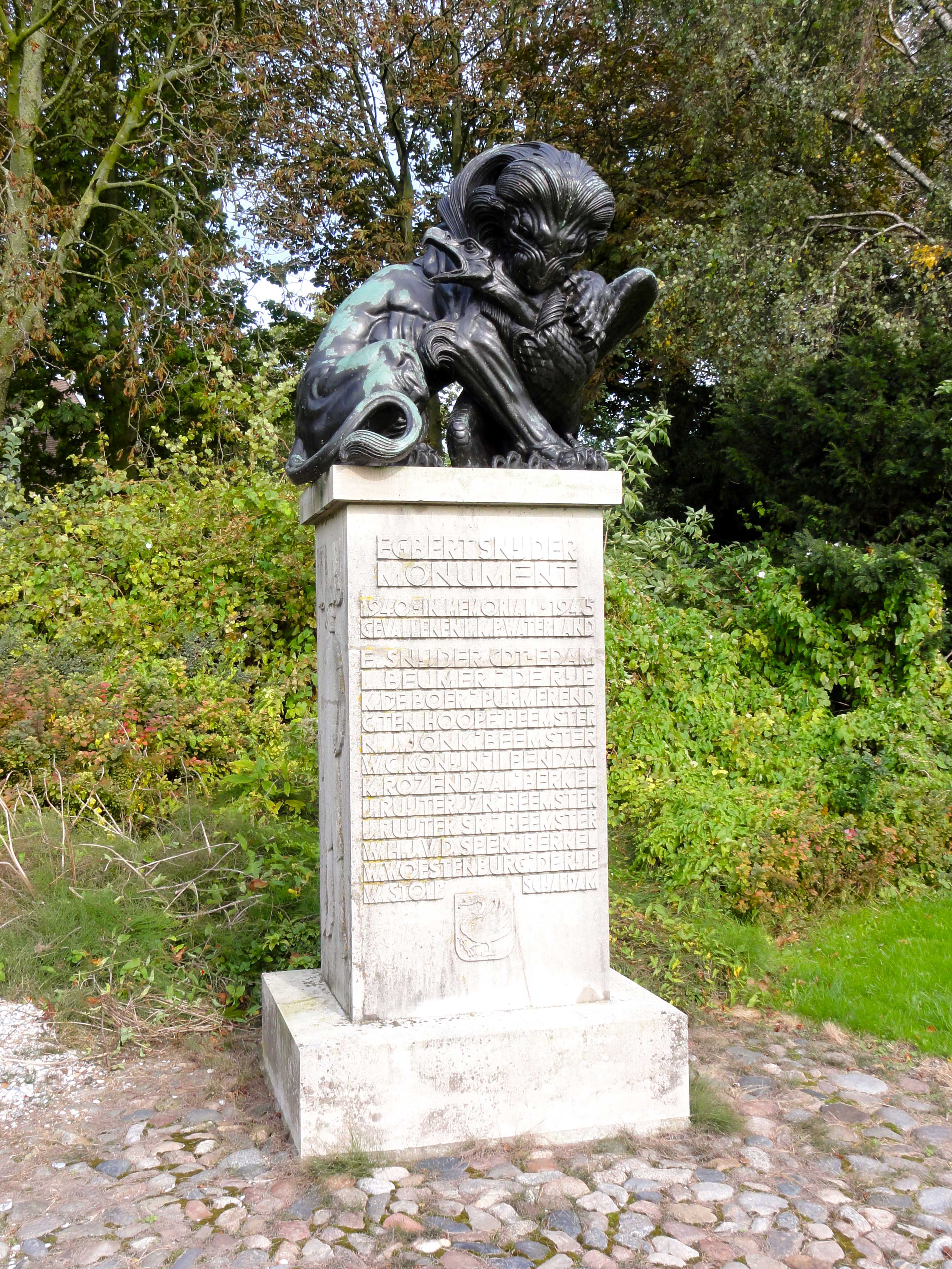 'Egbert Snijder Monument' door Jaap Kaas in Edam